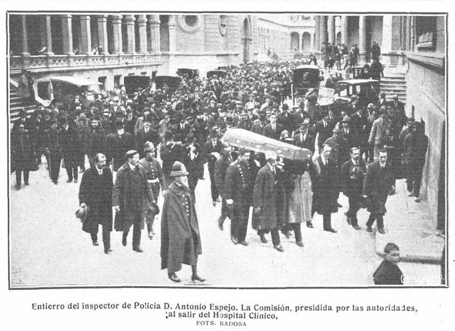 Entierro del inspector de policía Antonio Espejo. La Comisión, presidida por las autoridades, al salir del hospital clínico.